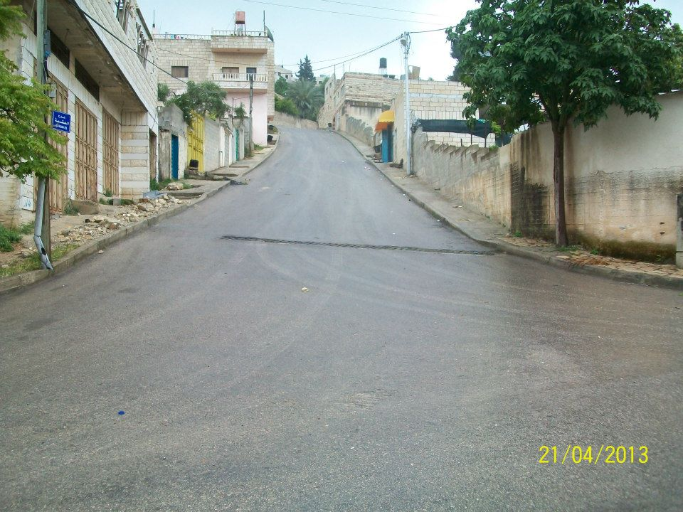 بلدة قبلان - جزء من شارع المدارس